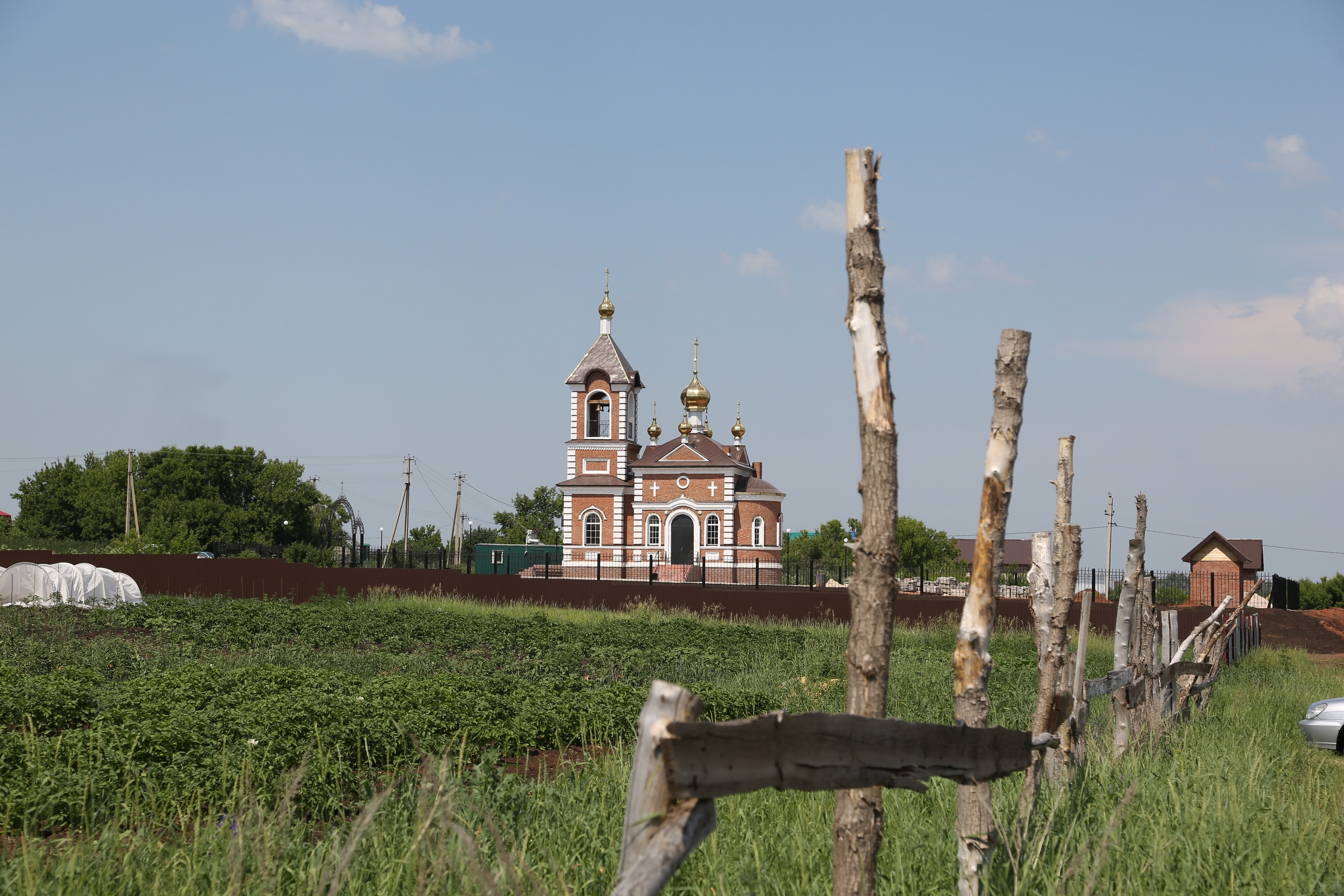 В_2015_году_в_с._Столяровка_была_освящена_Церковь_во_имя_Благовещения_Божией_Матери